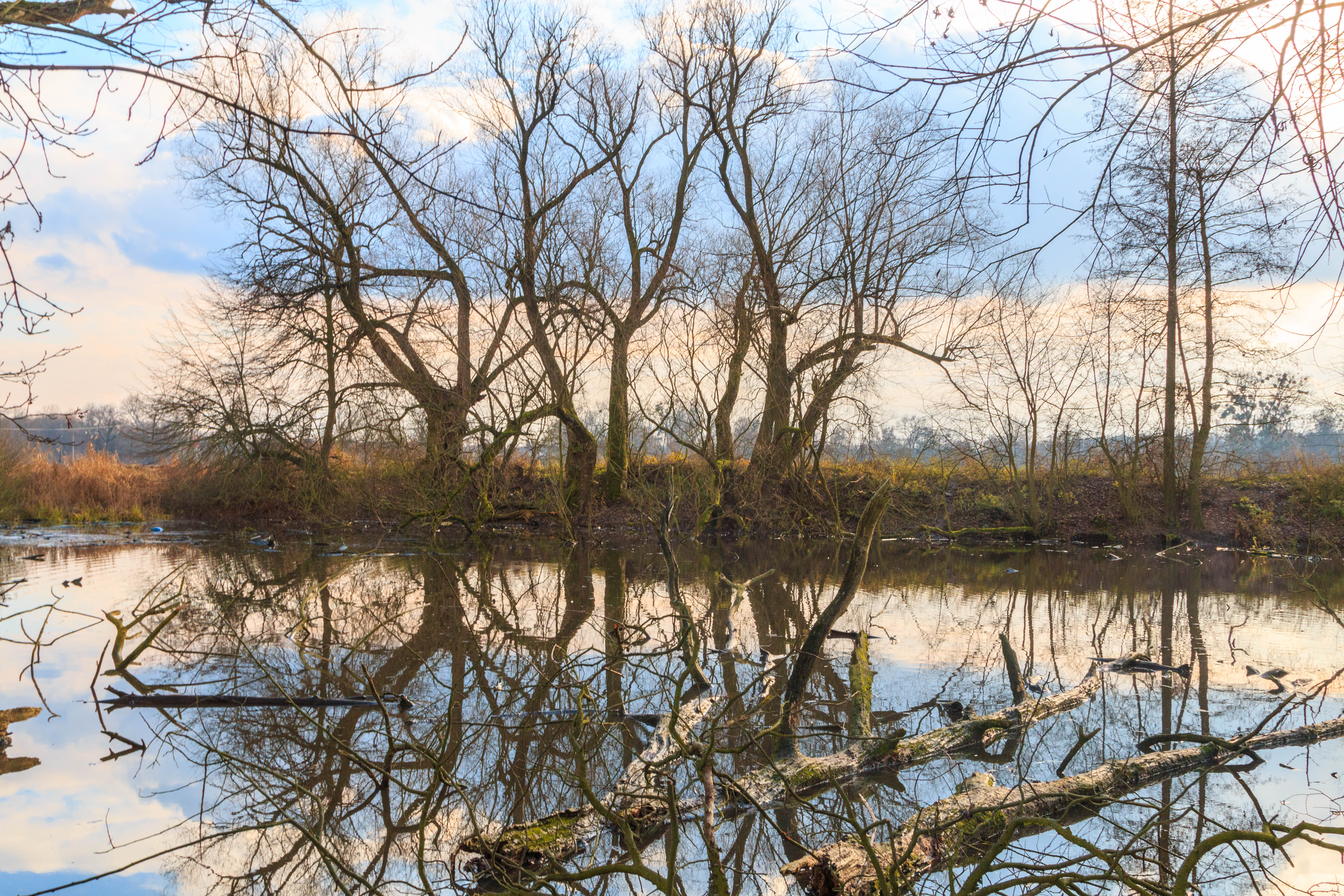 Živanické jezero Project: Vodstvo.